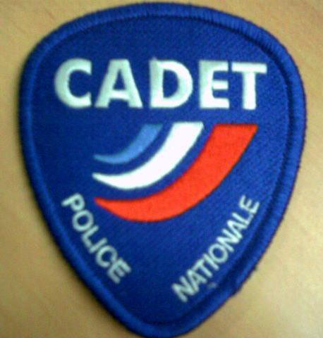 insigne des cadets, Police Nationale, France